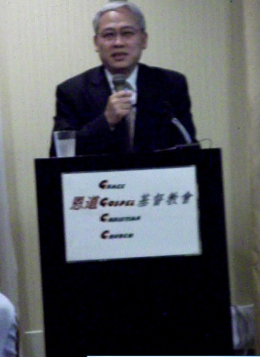 远志明.jpg